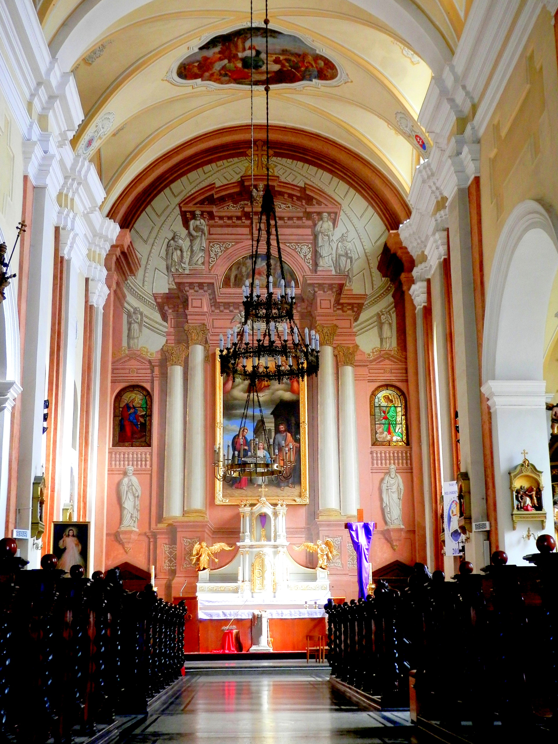 Streda 23.3.2016, kostol svätého Jozefa (Františkáni), veľkonočná výzdoba interiéru. Mesto Prešov.